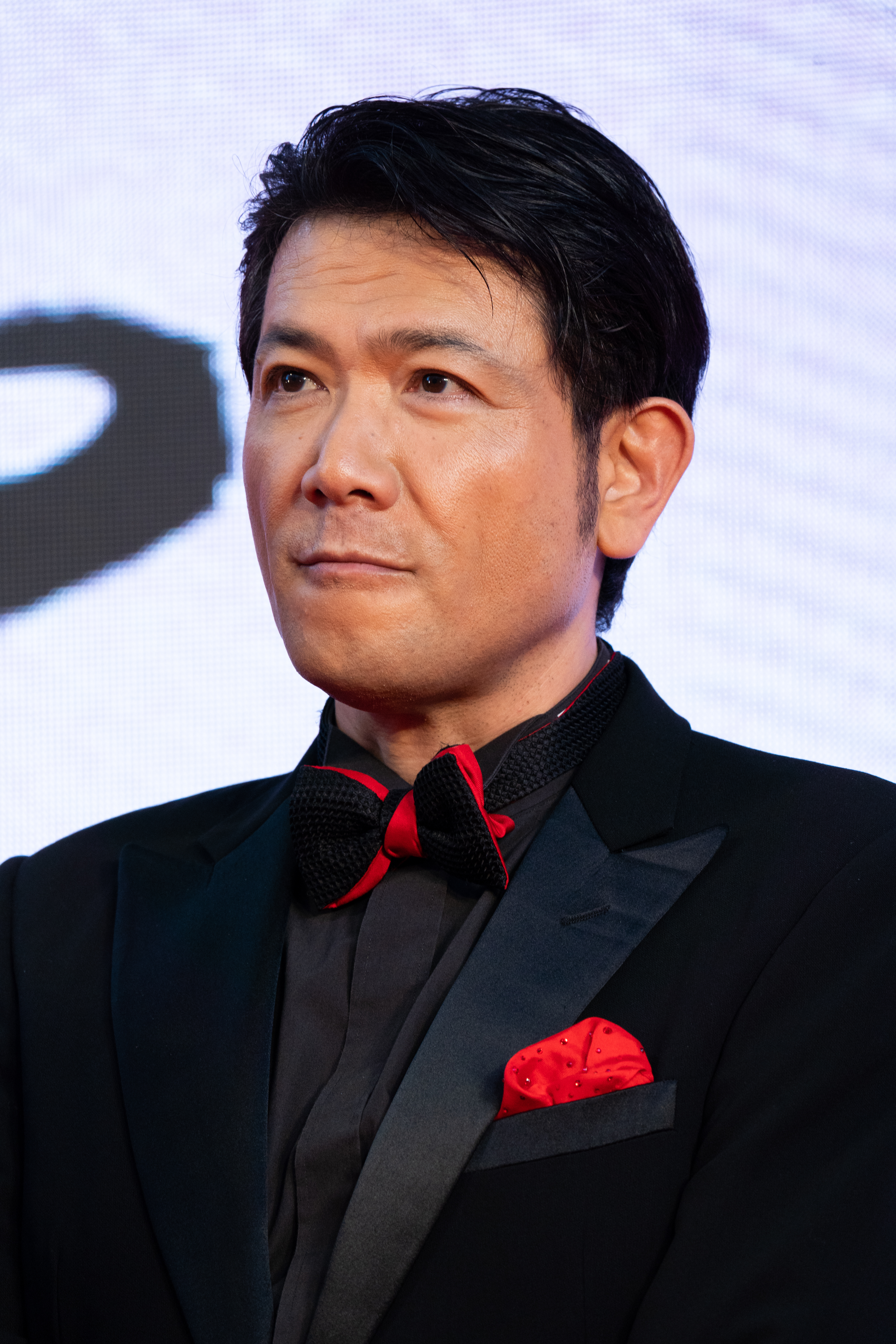 第32回 東京国際映画祭 オープニングセレモニー 別所哲也 (その瞬間、僕は泣きたくなった)